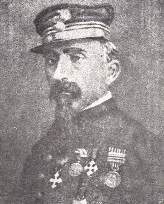 Giambattista Pentasuglia, componente della Spedizione dei Mille